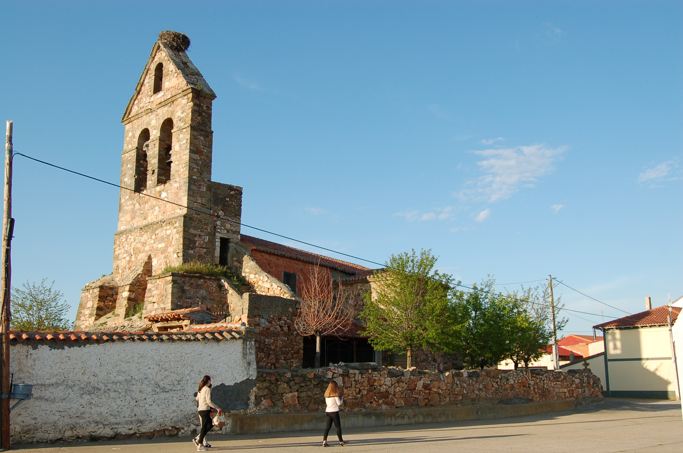 Igrexa de Micereces de Tera